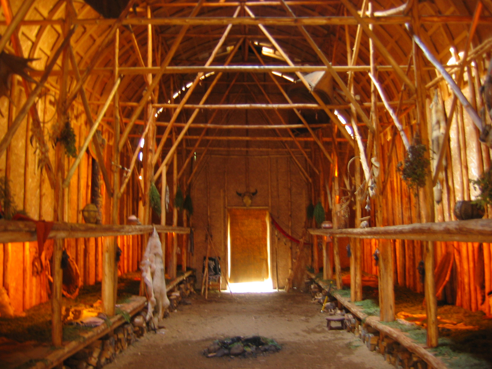 Village Amérindien Mokotakan, Mauricie, Québec